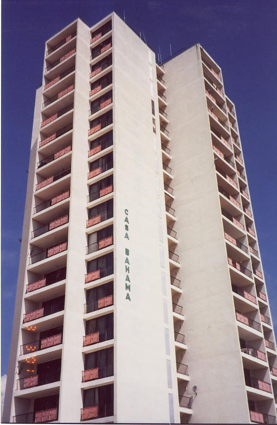 Casa Bahama condominium building at Lucaya, Bahamas